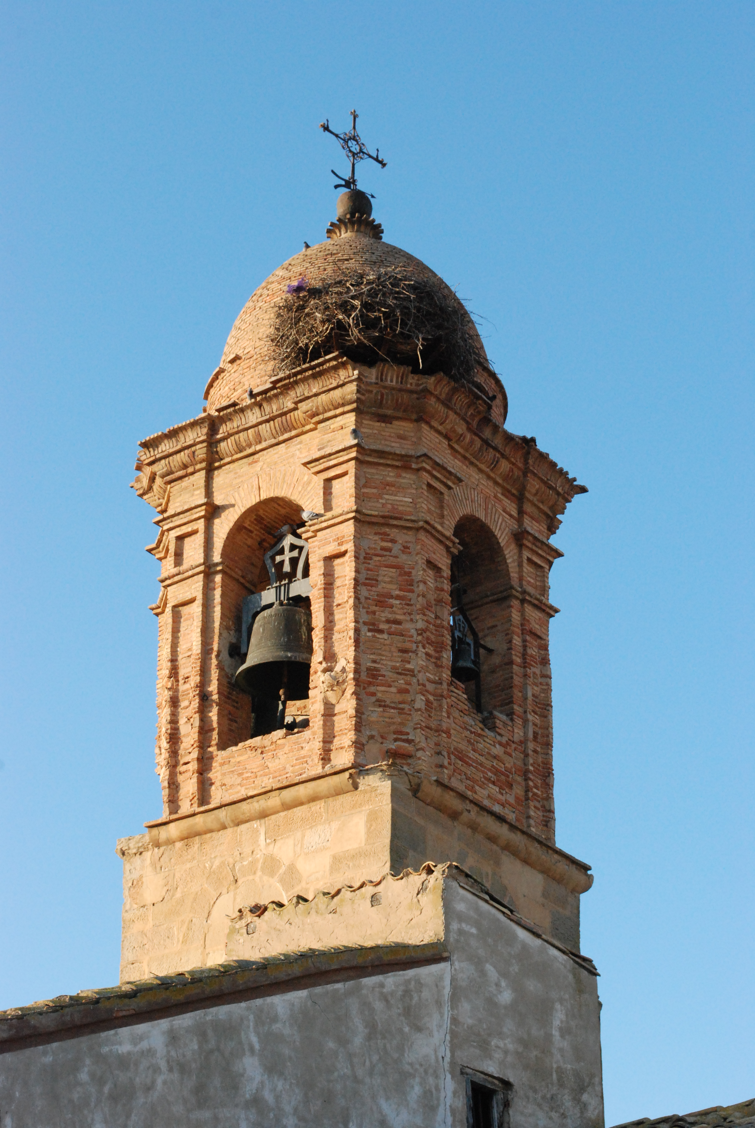 Torre de la iglesia del pueblo de Lazagurría